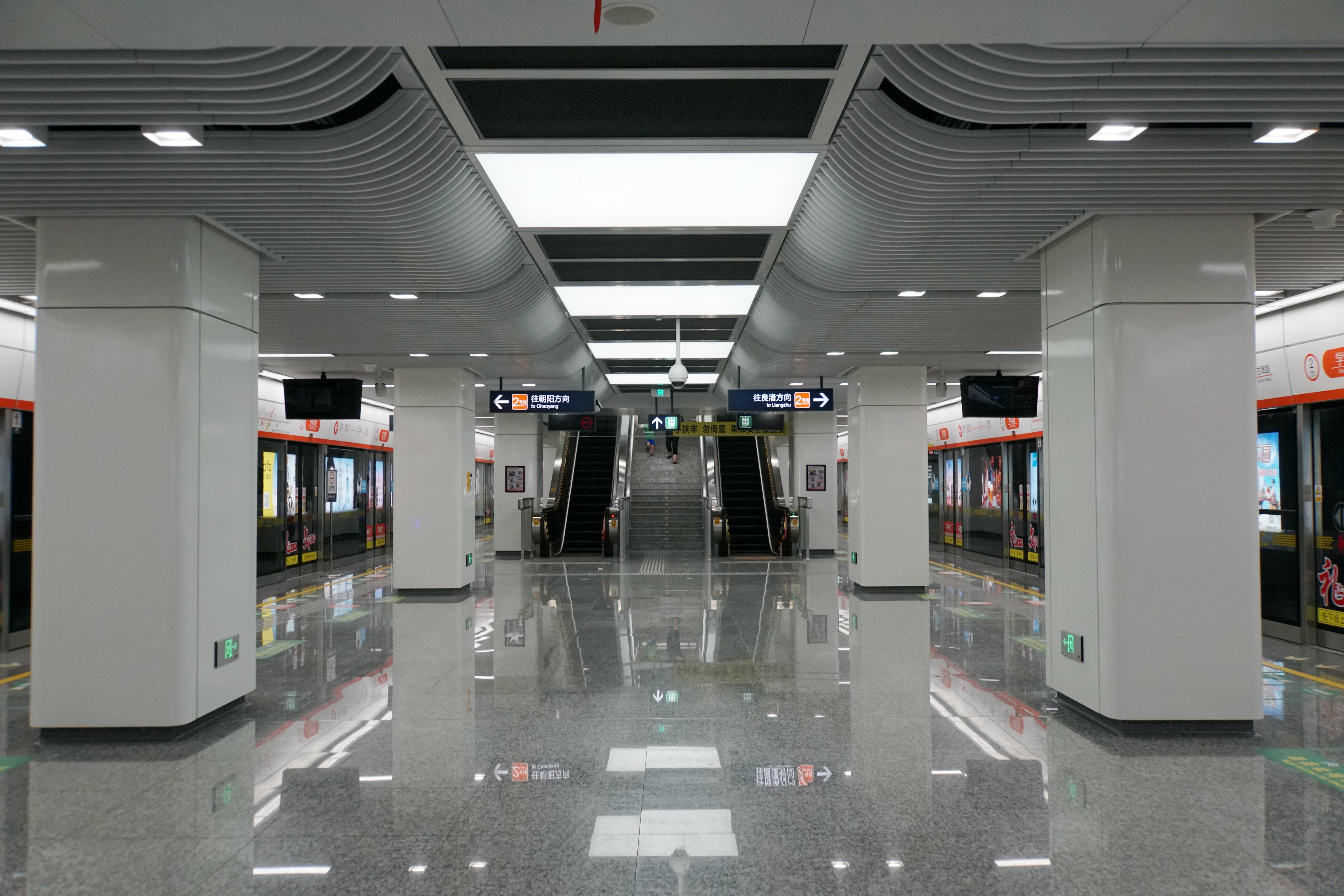 学院路站站台